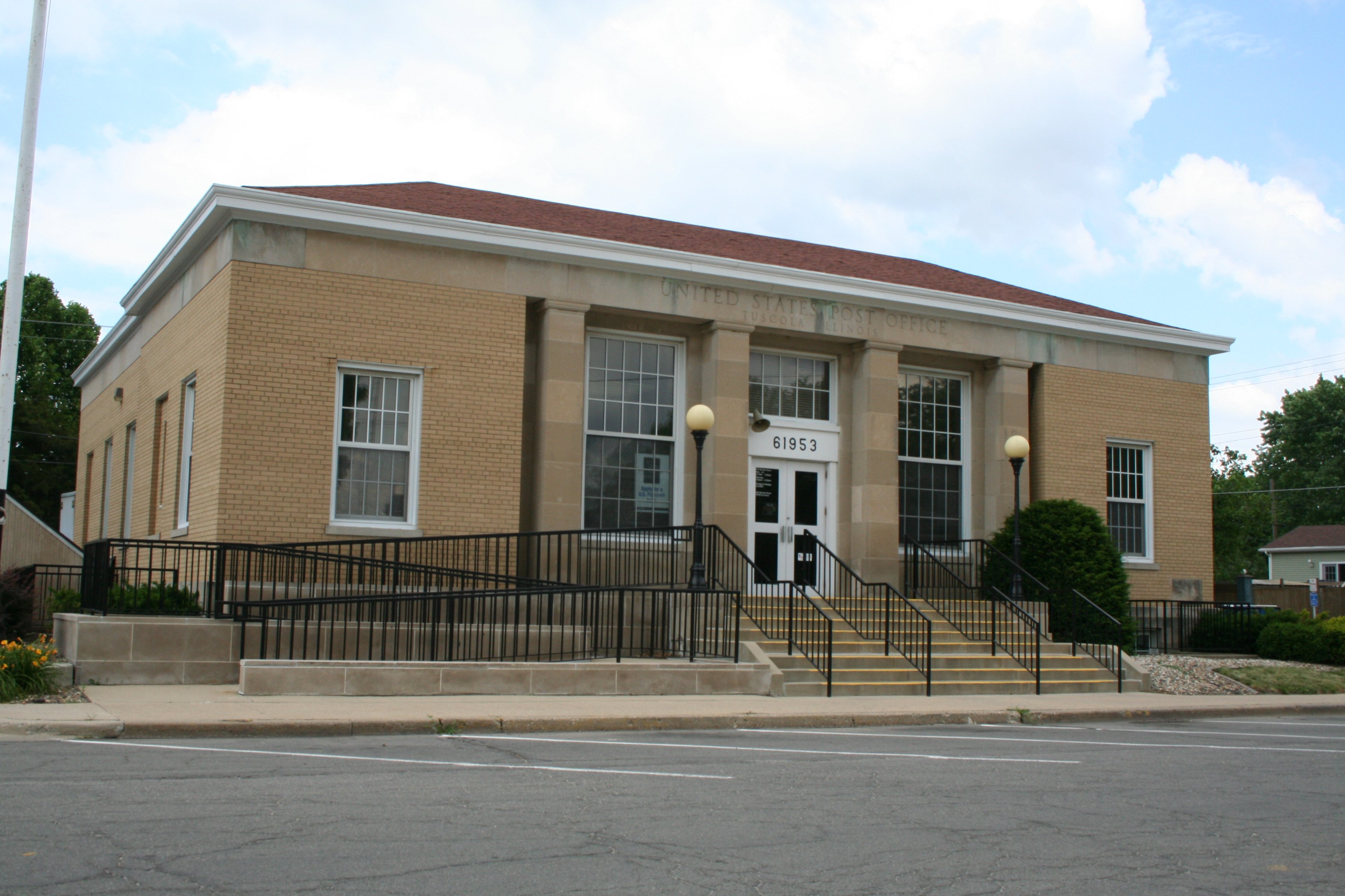 Tuscola_Illinois_Post_Office